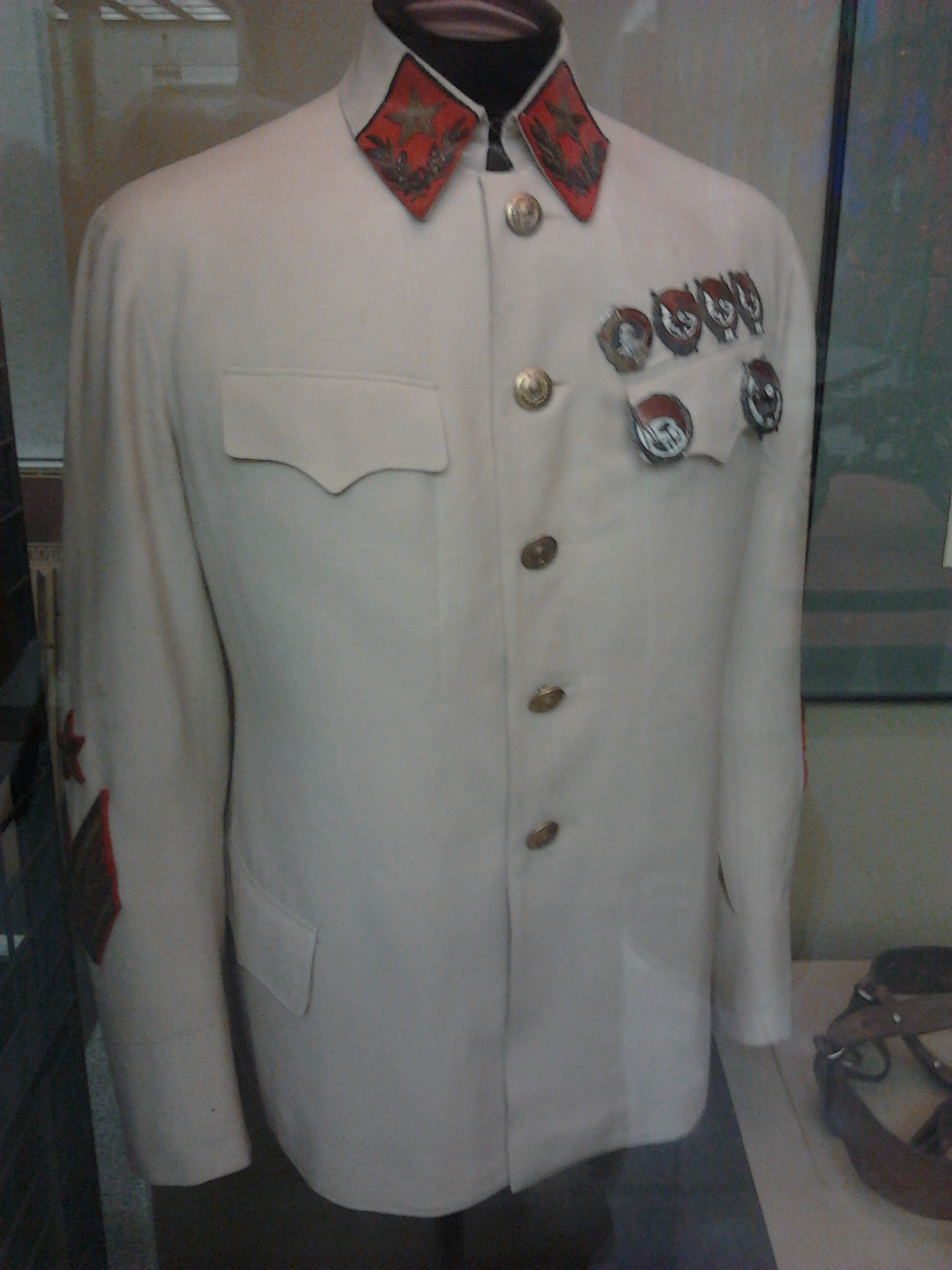 Музей Победы на Поклонной горе